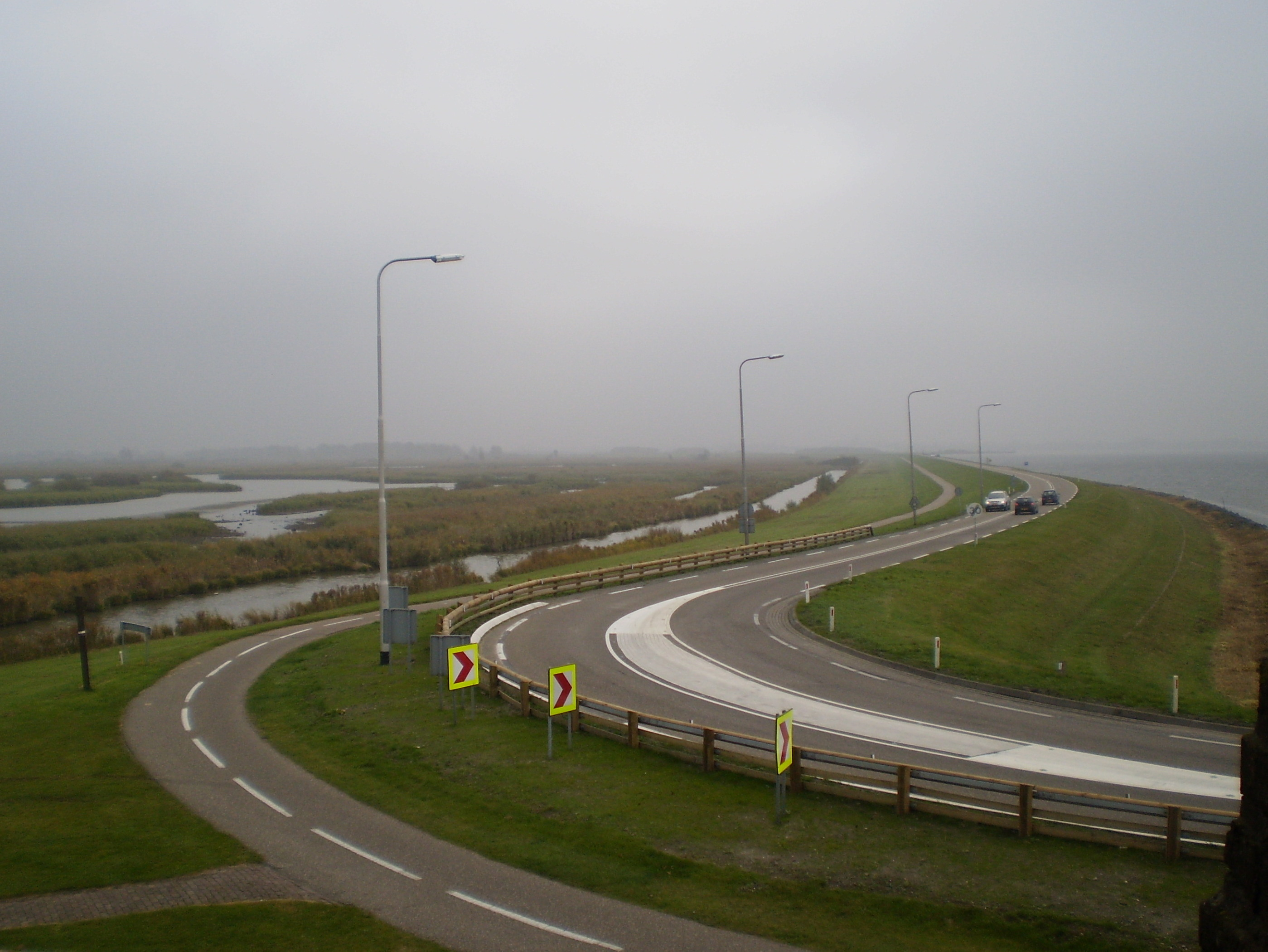 Bocht in Knardijk, Provinciale weg 707, Flevoland, NL. Rechts Veluwerandmeer Wolderwijd, links natuurgebied Harderbroek